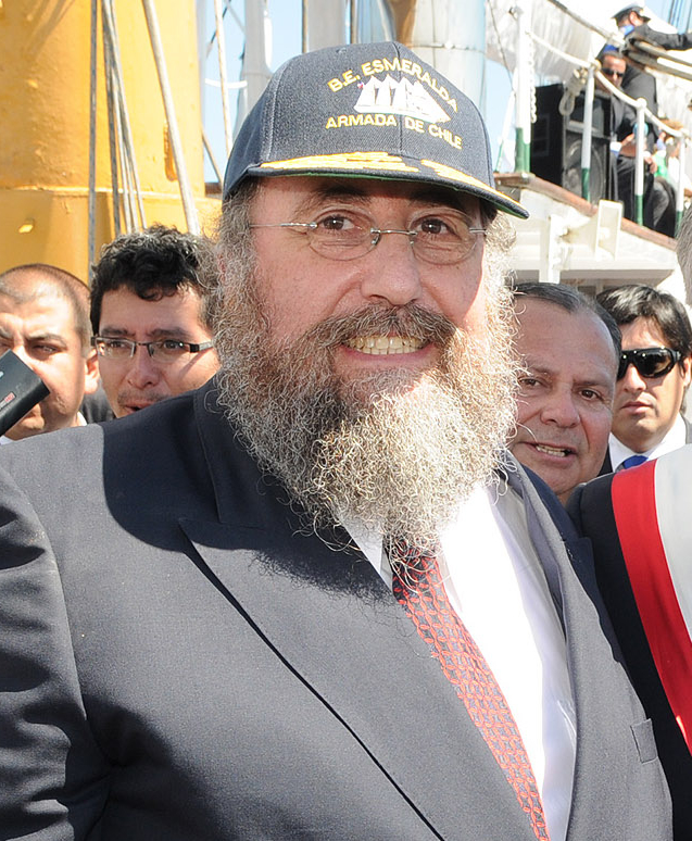 Sergio Melnick: autor, ingeniero y decano chileno en 2010.